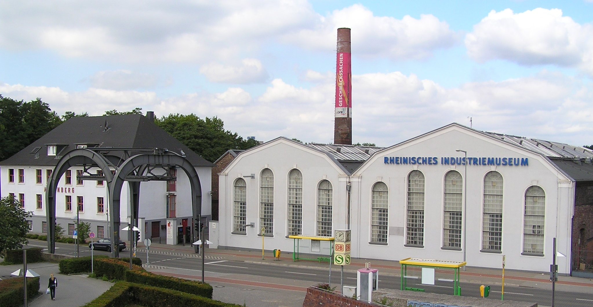 Industrial museum "Rheinisches Industriemuseum" (zinc metallurgy Altenberg), Oberhausen